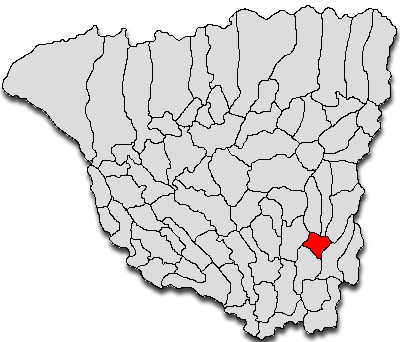 Categorie:Hărţi ale judeţului Gorj